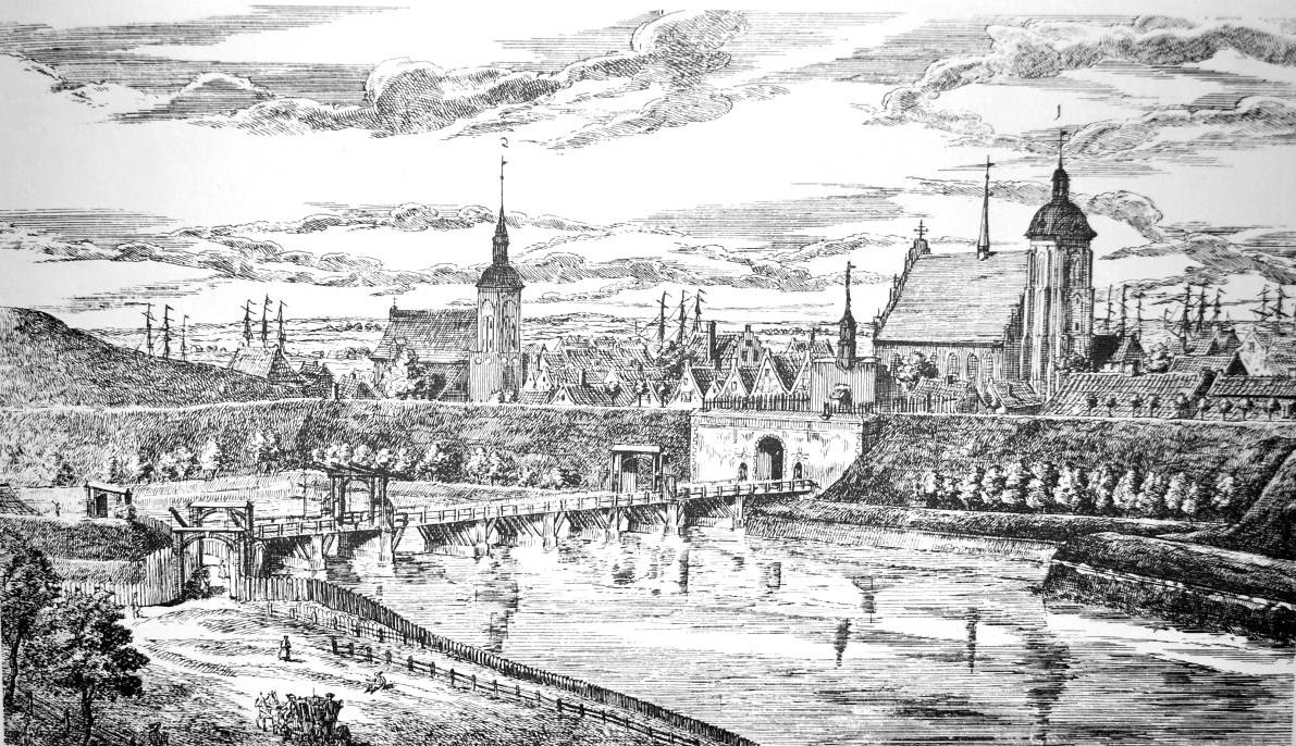 Nieistniejąca brama św. Jakuba i Opływ Motławy w Gdańsku - rycina z drugiej połowy XVIII w. Po lewej kościół św. Jakuba, po prawej św. Bartłomieja.